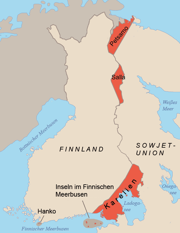 Karte der Gebiete, die nach dem Fortsetzungskrieg 1944 von Finnland an die Sowjetunion abgetreten wurden.